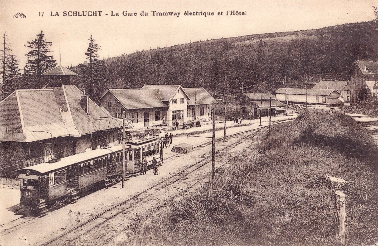 Carte postale ancienne éditée par CAP, n°17 :LA SCHLUCHT - La Gare du Tramway électrique et l'Hôtel